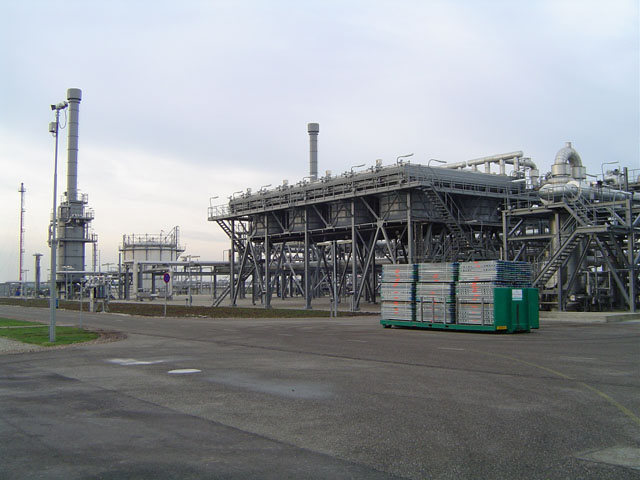 NAM ondergronds gasopslagveld bij Norg/Langelo